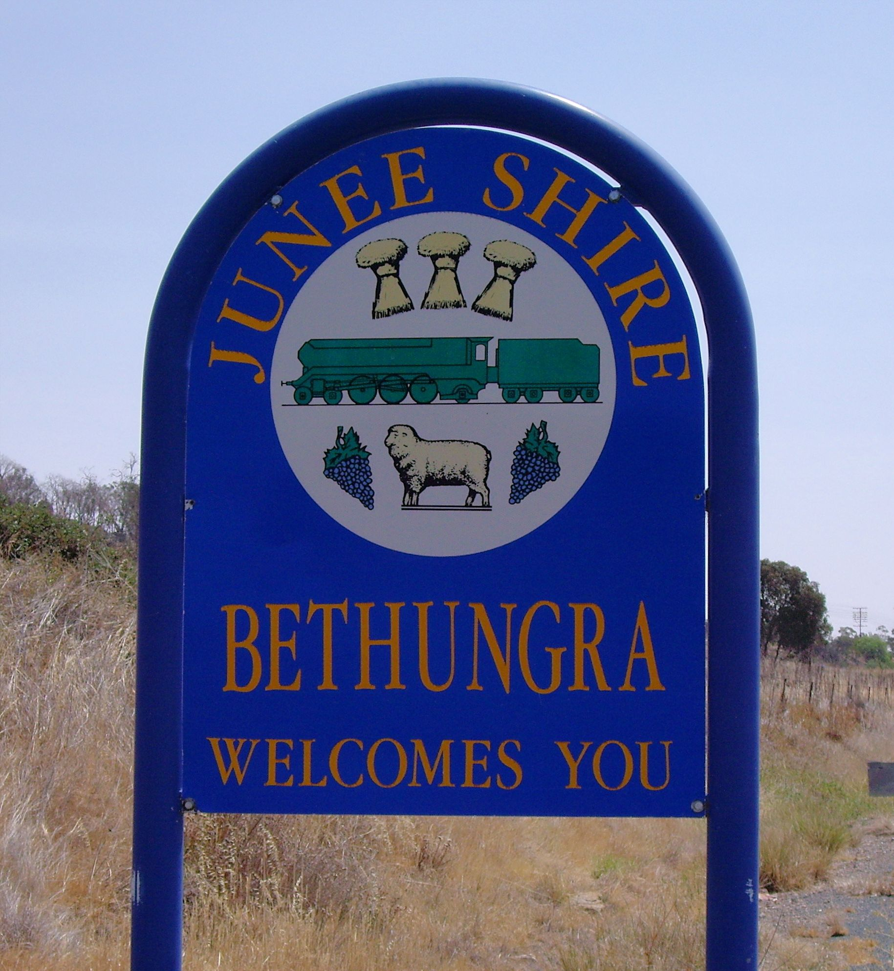 Entering Bethungra